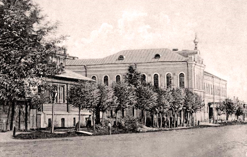 Здание Владимирского духовного училища